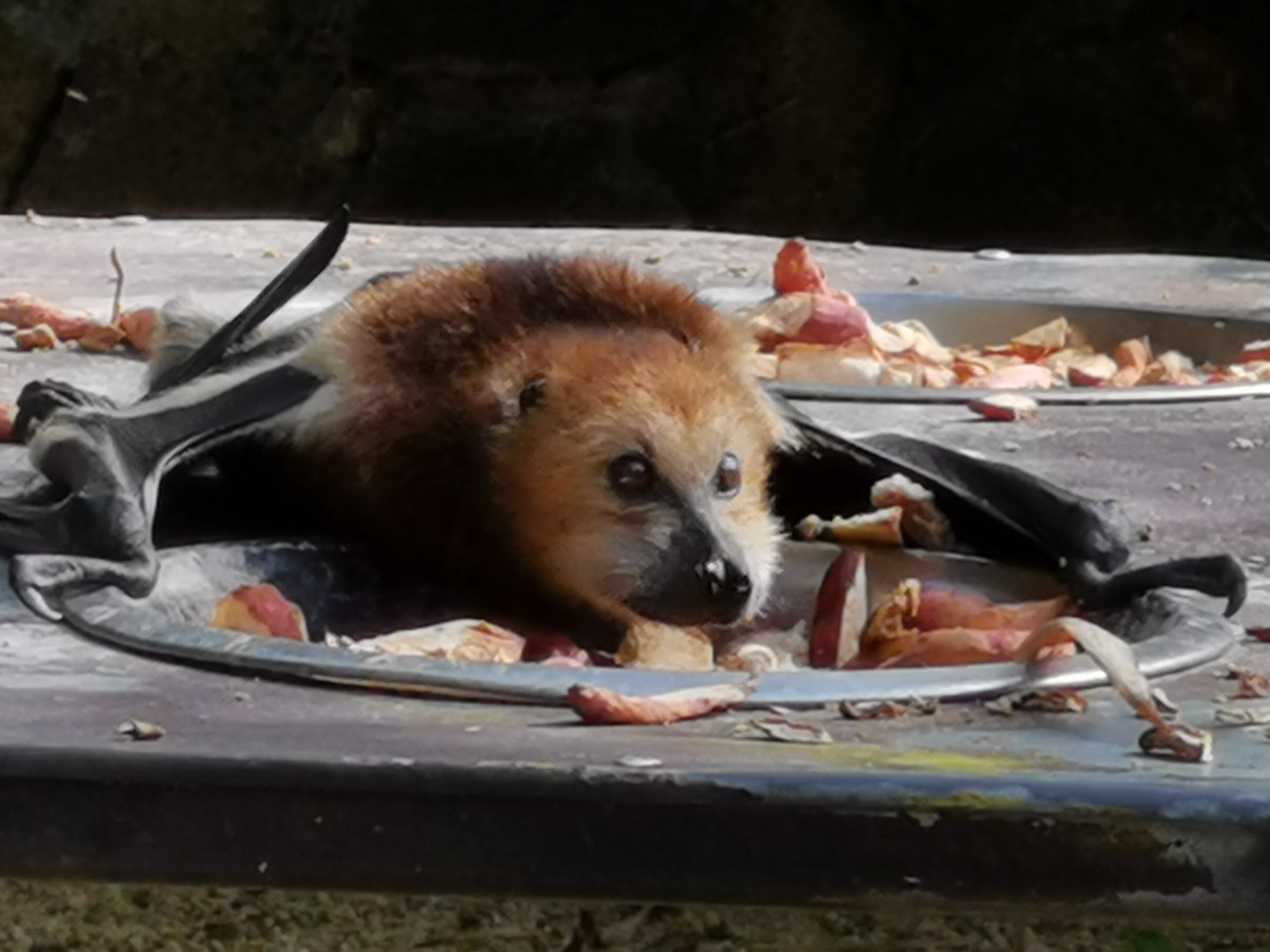 Pteropus niger beim Fressen im La Vanille Nature Park in Mauritius